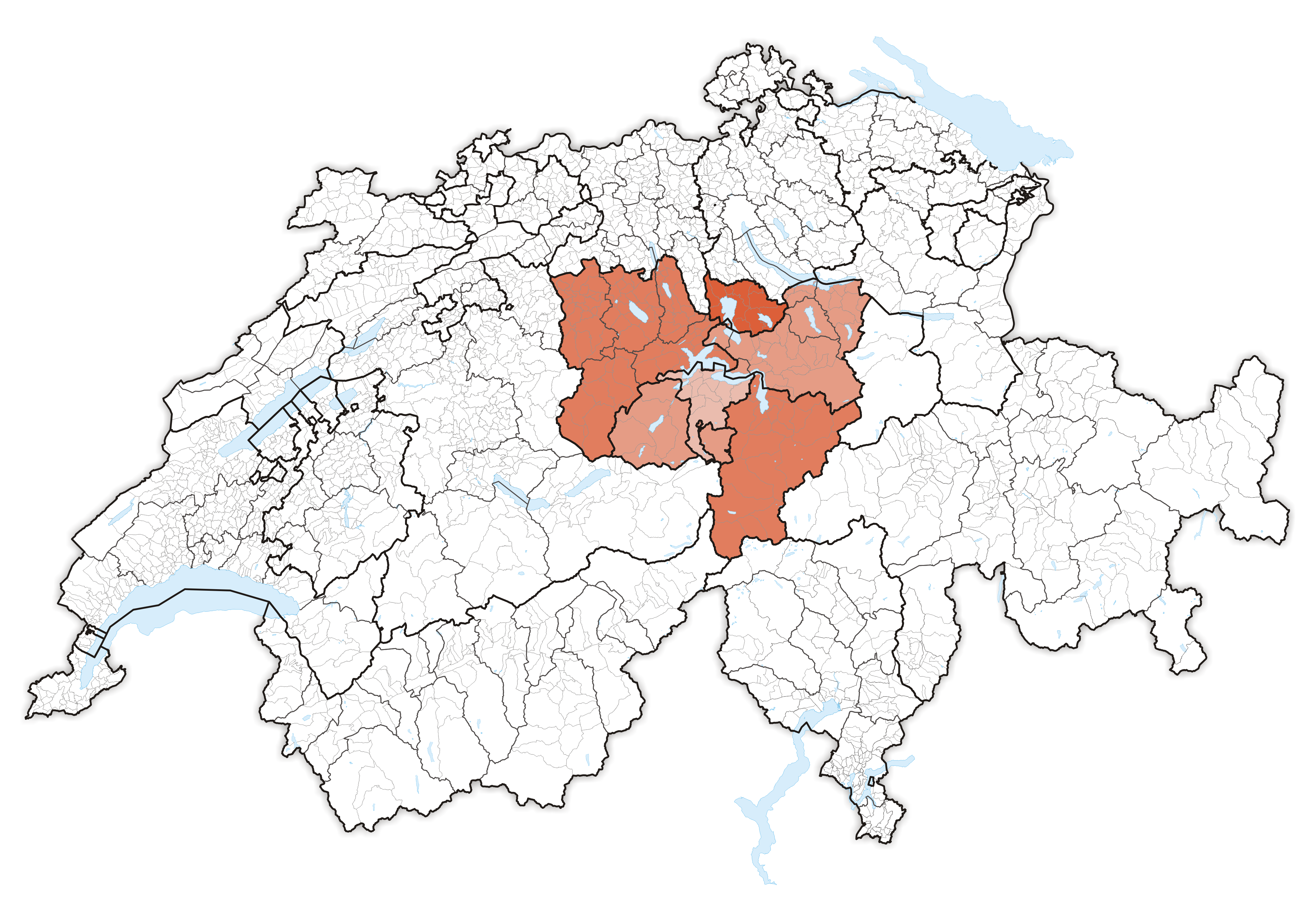 Zentralschweiz